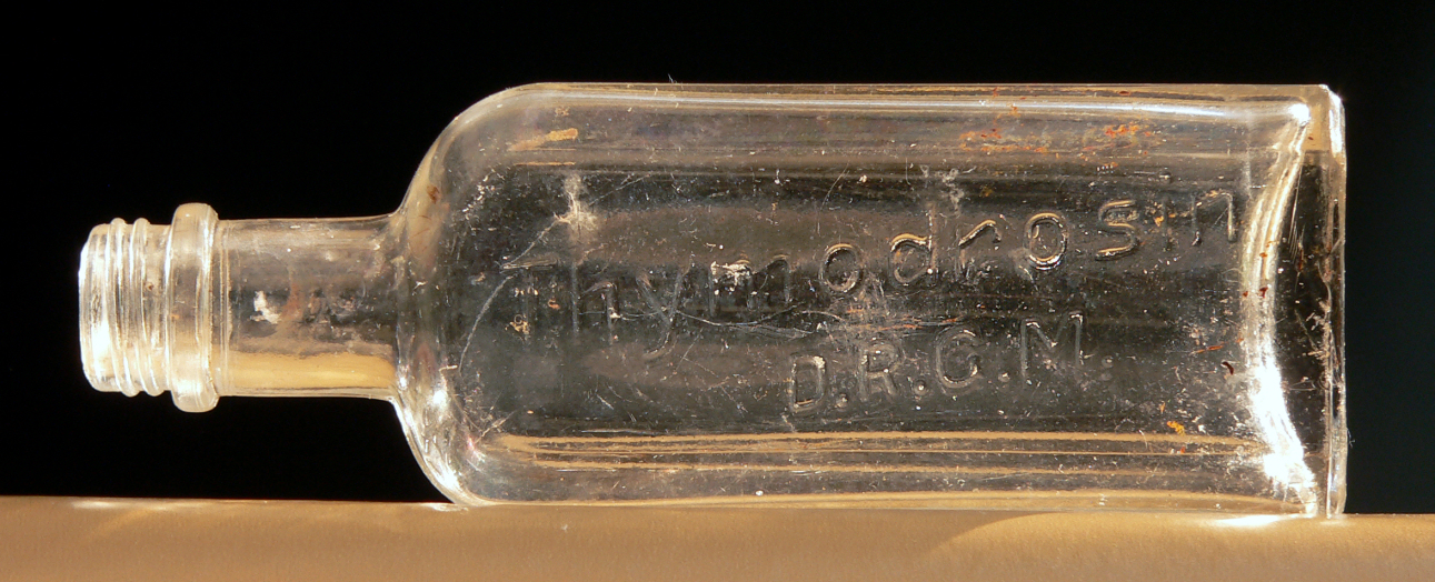 Flasche für Thymodrosin mit Eindruck DRGM für Deutsches Reichs-Gebrauchsmuster, gefunden in Hannover